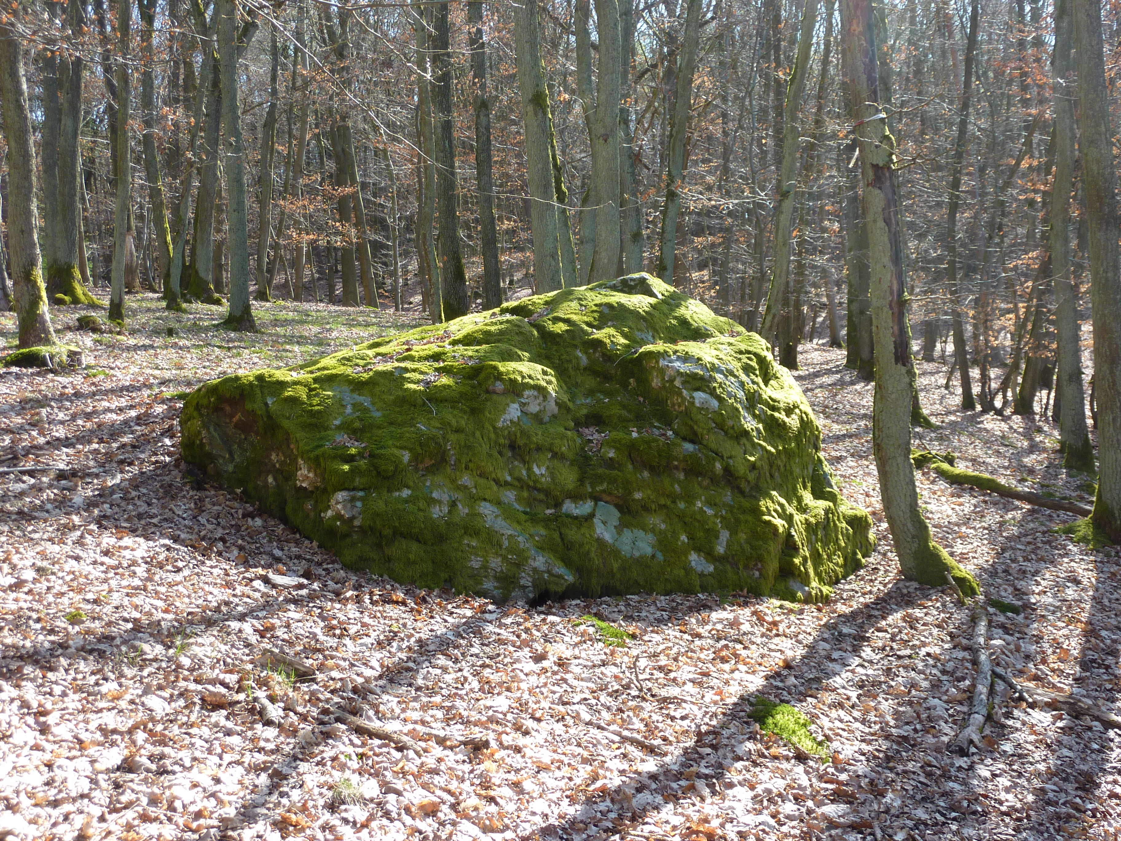 Dicker Stein bei Weidenhausen-Gladenbach